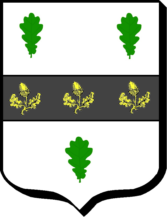 D'argent, à la fasce de sable chargée de 3 glands attachés à leurs coupelles et branchettes d'or, accompagné de 3 feuilles de chêne de sinople, 2 & 1.